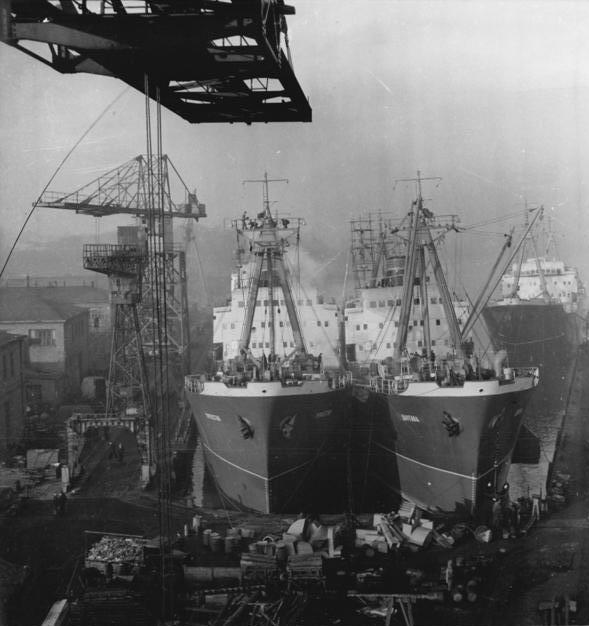 Rostock, Neptun-Werft, Ausrüstungskai Zentralbild Mellahn 22.12.1958 Rostock: 3000-Tonnen-Frachter der Neptunwerft zukünftig nach halbjähriger Bauzeit fertig. Die bewährten und international stark beachteten 3000-Tonnen-Frachter aus dem Produktionsprogramm der Rostocker Neptunwerft, von denen bereits mehr als 30 auf allen Meeren der Erde zu Hause sind, sollen künftig in einer Gesamtbauzeit von etwa einem halben Jahr pro Schiff hergestellt werden. Damit soll das Bautempo auf westdeutschen Werften zum Teil bereits überboten werden. Dies wurde jetzt auf einer politisch-ökonomischen Konferenz mit 450 der besten Produktionsarbeiter, Techniker und Ingenieure des Rostocker Schiffbaubetriebes bekannt. UB.z.: Blick auf fast fertige 3000-Tonnen-Frachter, die für Sowjetunion bestimmt sind. Links der Frachter TURKISTAN, dessen Probefahrt für Februar 1959 vorgesehen war, der jedoch noch in diesem Jahr fertiggestellt werden soll. Damit wird das Exportprogramm der Werft um einen 3000-Tonnen-Frachter übererfüllt werden.